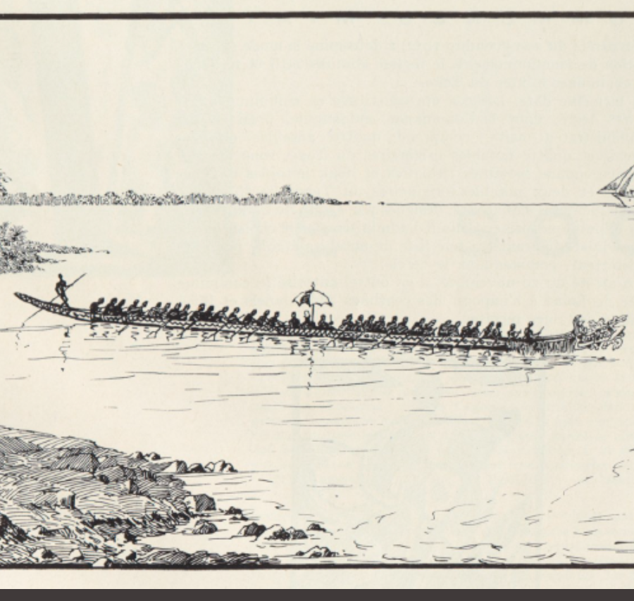 Pirogue du Roi des Malimba Moukoko Manyanye "King Pass All", assis au centre sous le parasol